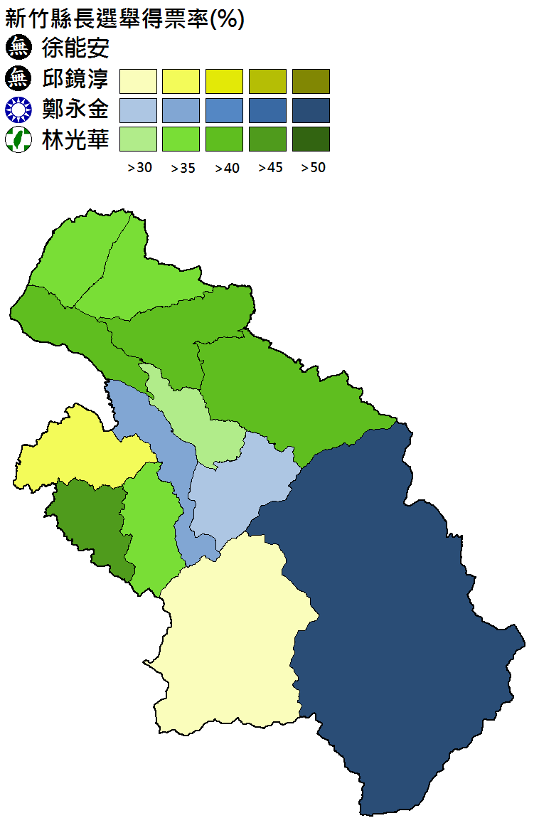 1997年新竹縣長選舉